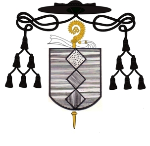 Wappen Sebastian Conen, 1697 - 1766, Abt von Münsterschwarzach (1761-1766)